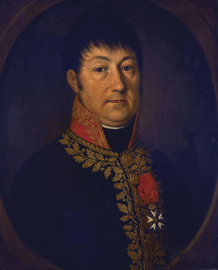 Claude François Duprès, général et baron de l'Empire (1755-1808).